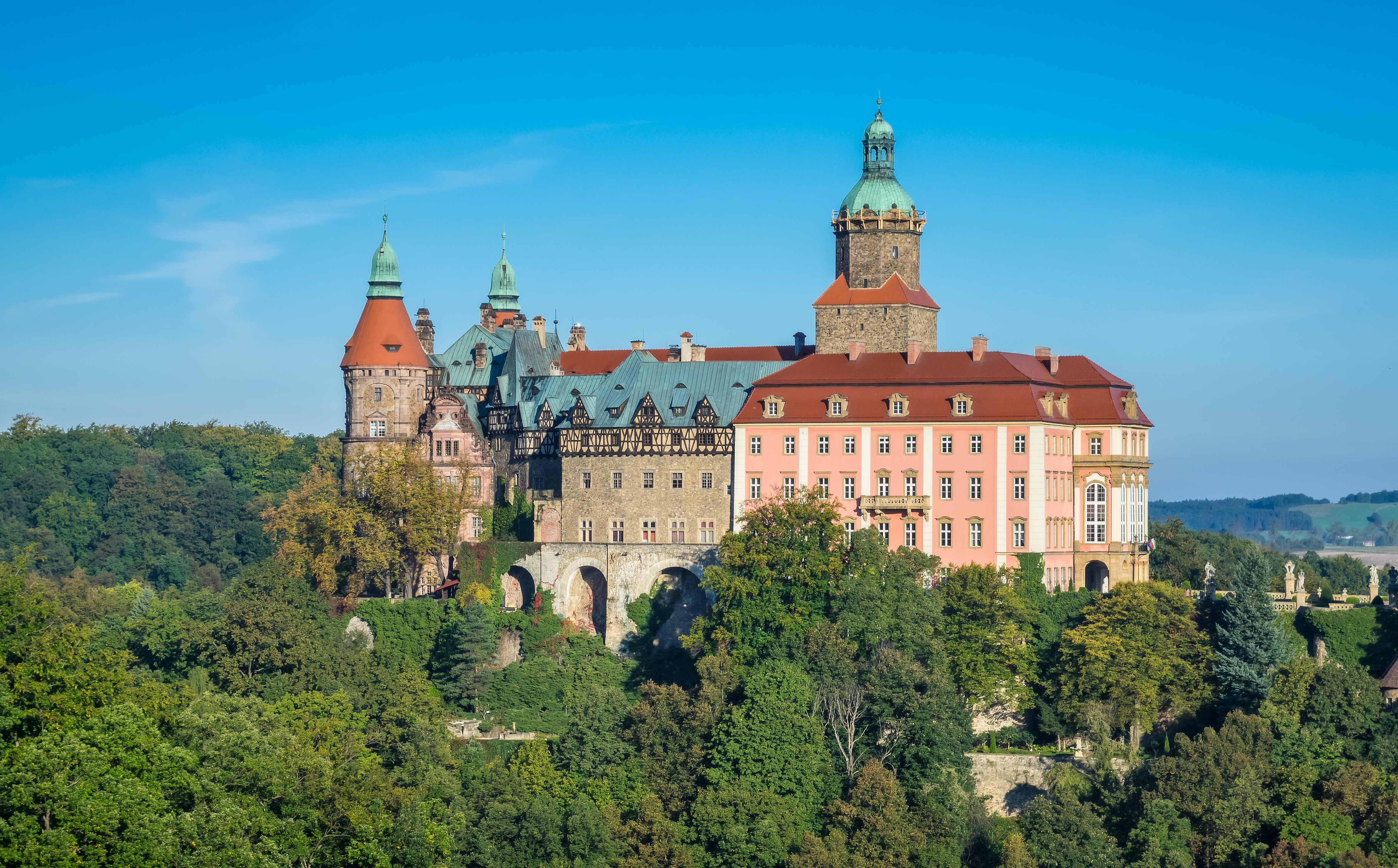 Zamek Książ